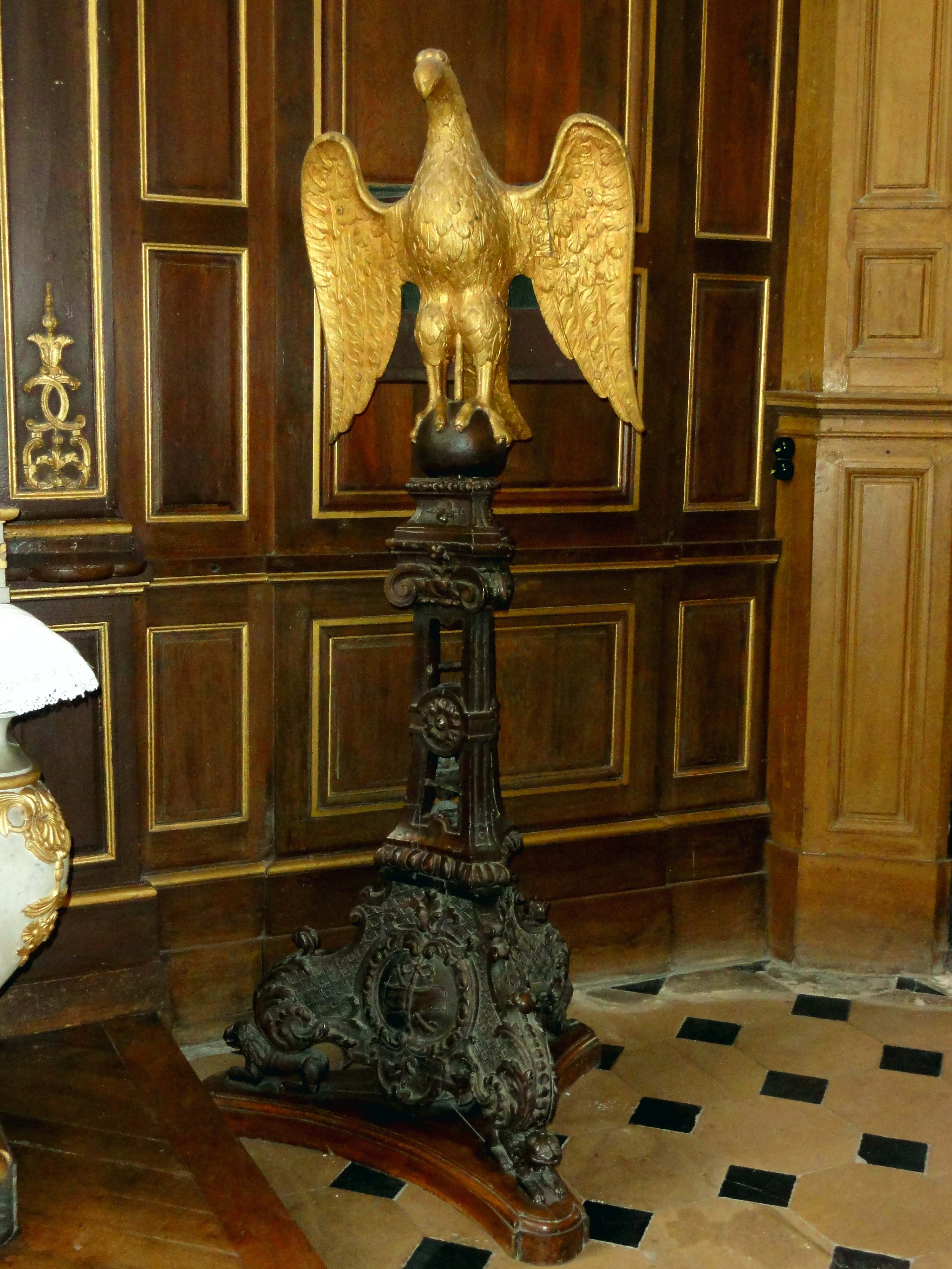 Mobilier de l'église (voir titre).